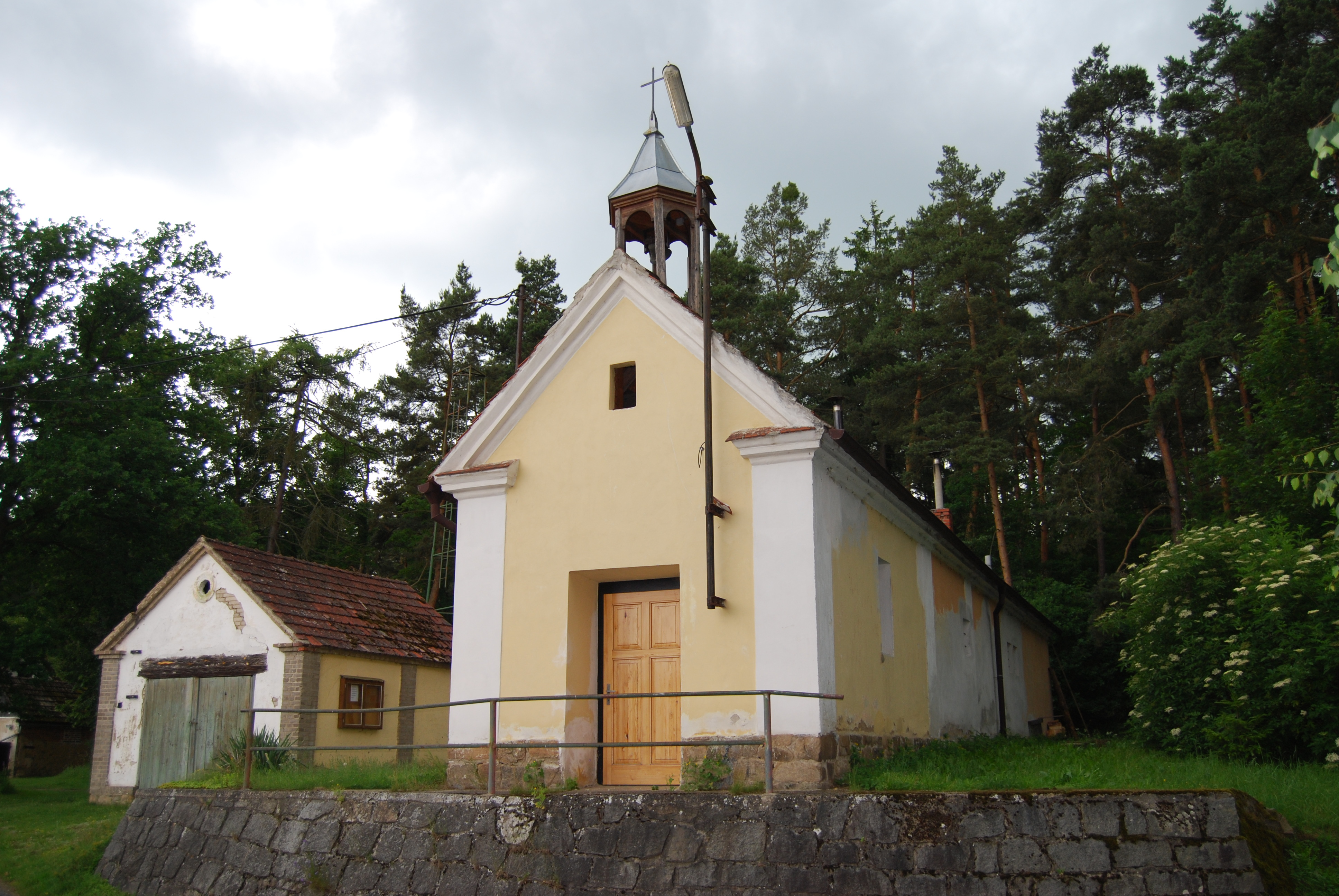 Návesní kaple. Laziště je vesnice v okrese Písek, část obce Králova Lhota. Česká republika.